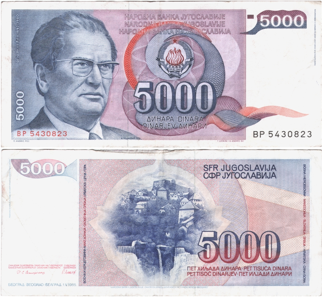 5000 dinara iz 1985. godine, SFRJ